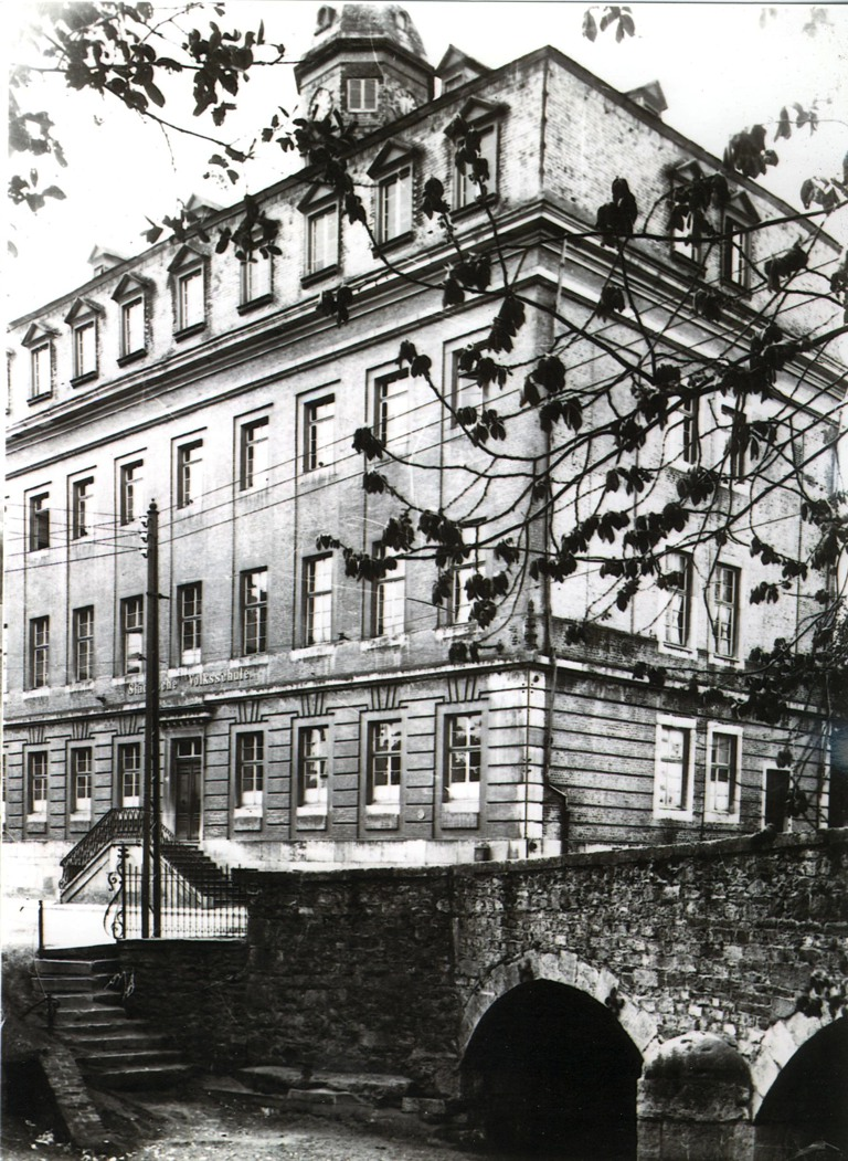 Haus Scheibler in Eupen, abgerissen 1969